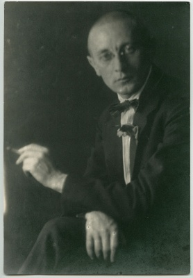 Joh. Mülberi autoportree